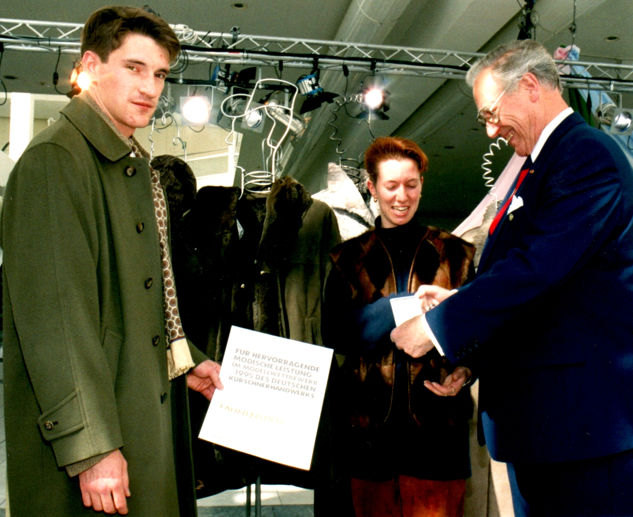 Leistungswettbewerb des Kürschnerhandwerks anlässlich der Pelzmesse Frankfurt/Main Kürschnermeister Andreas Fahnenstich bekommt die Goldmedaille mit Urkunde überreicht. Die Dame mit der prämierten Weste, rechts der Vorsitzende des Zentralverbands des Deutschen Kürschnerhandwerks Carl-Hans Adrian, Köln.